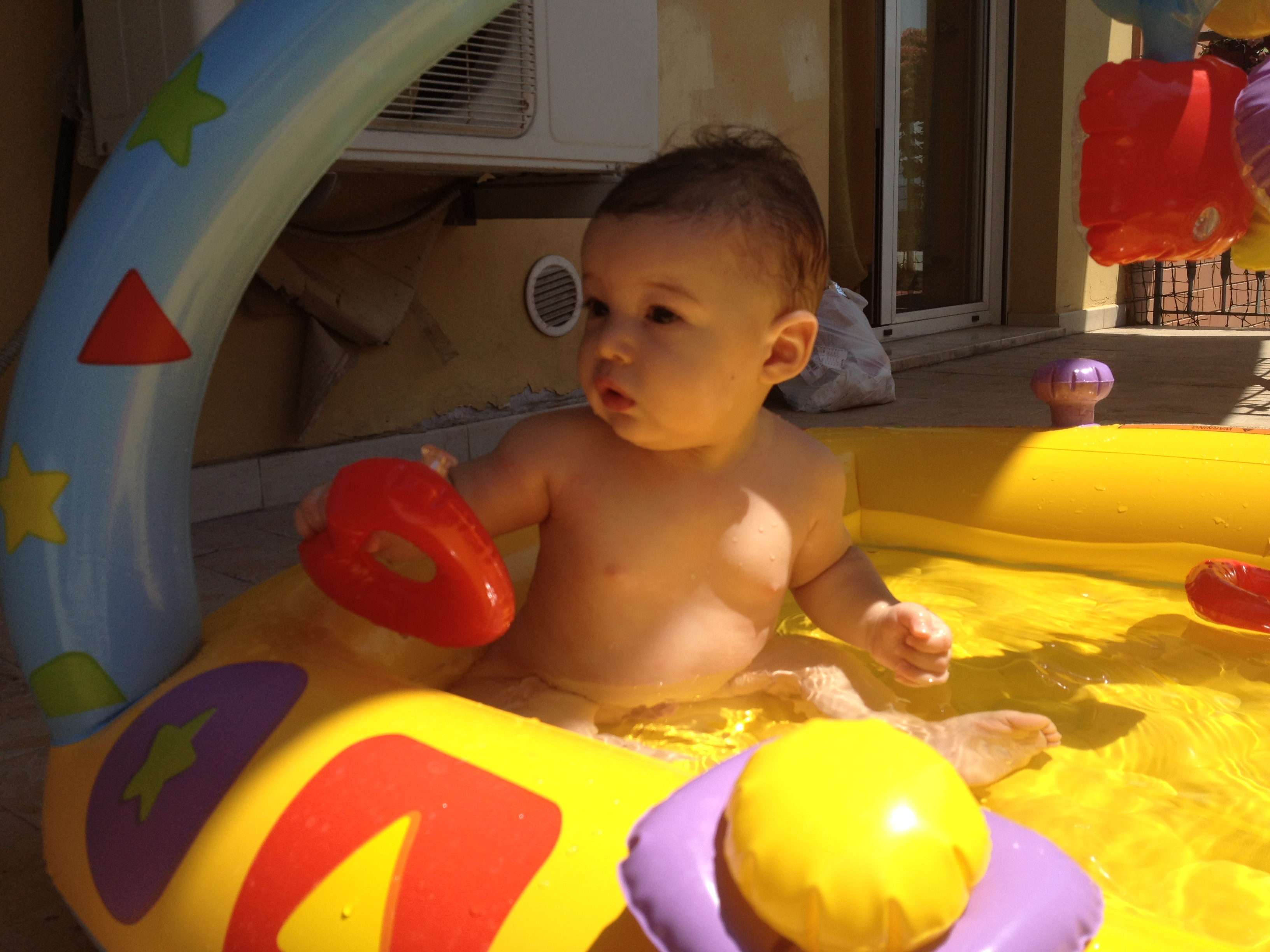 Eros si diverte nella sua piscina